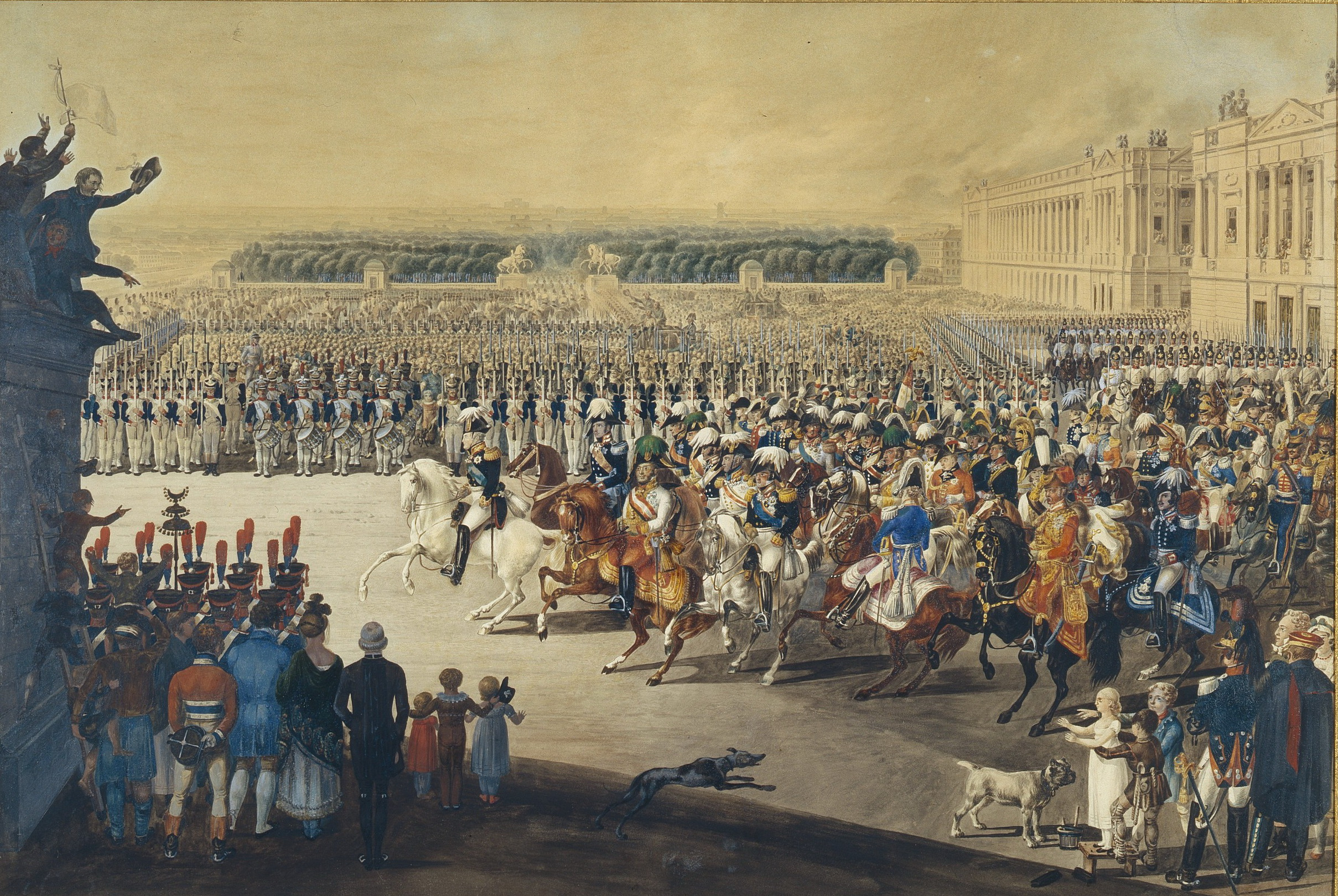 Малек де Ф. Вступление союзных войск в Париж 19 марта 1814. 1815